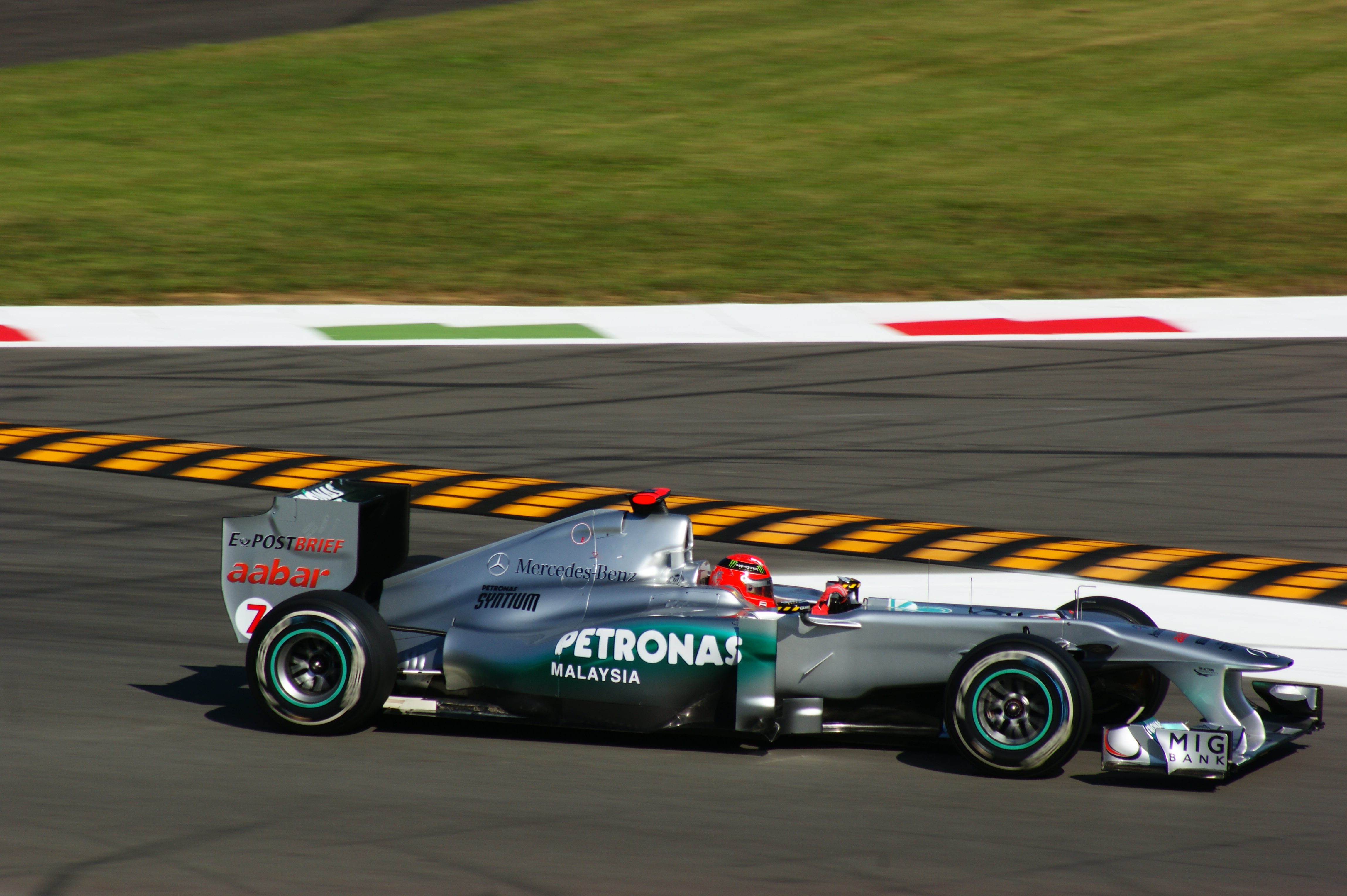 M. Schumacher alla prima variante Monza 2011